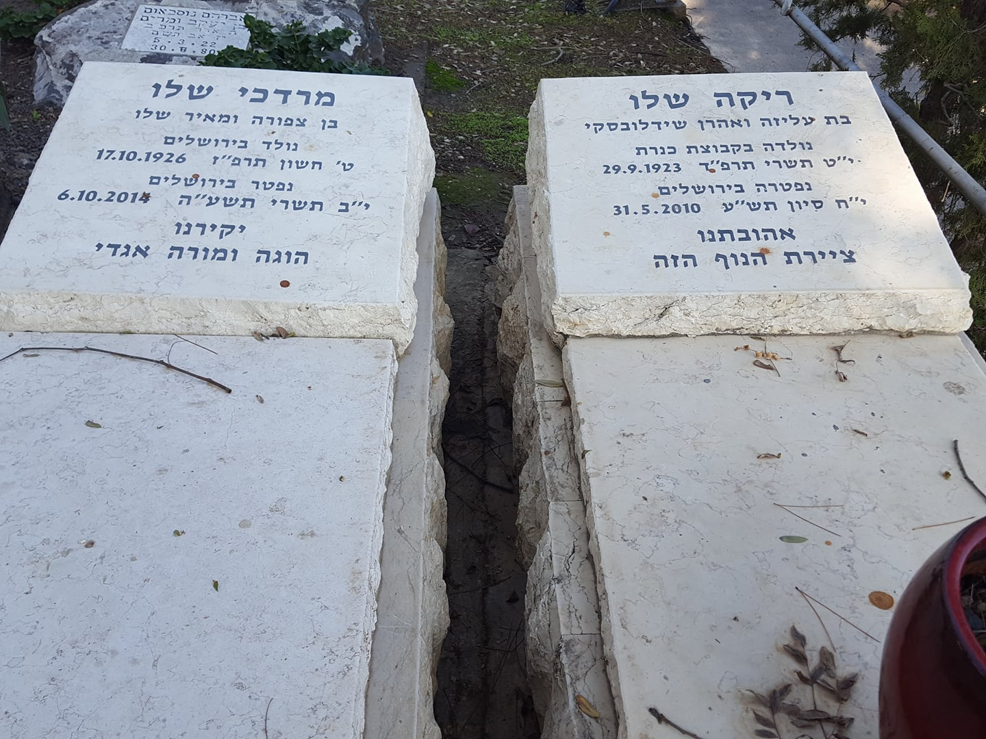 קברי הסופר מרדכי שלו ורעיתו הציירת ריקה שלו בבית הקברות כנרת צילום : אלי אלון